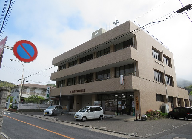 対馬農業協同組合（JA対馬）本店・厳原支店・潮菜館本店